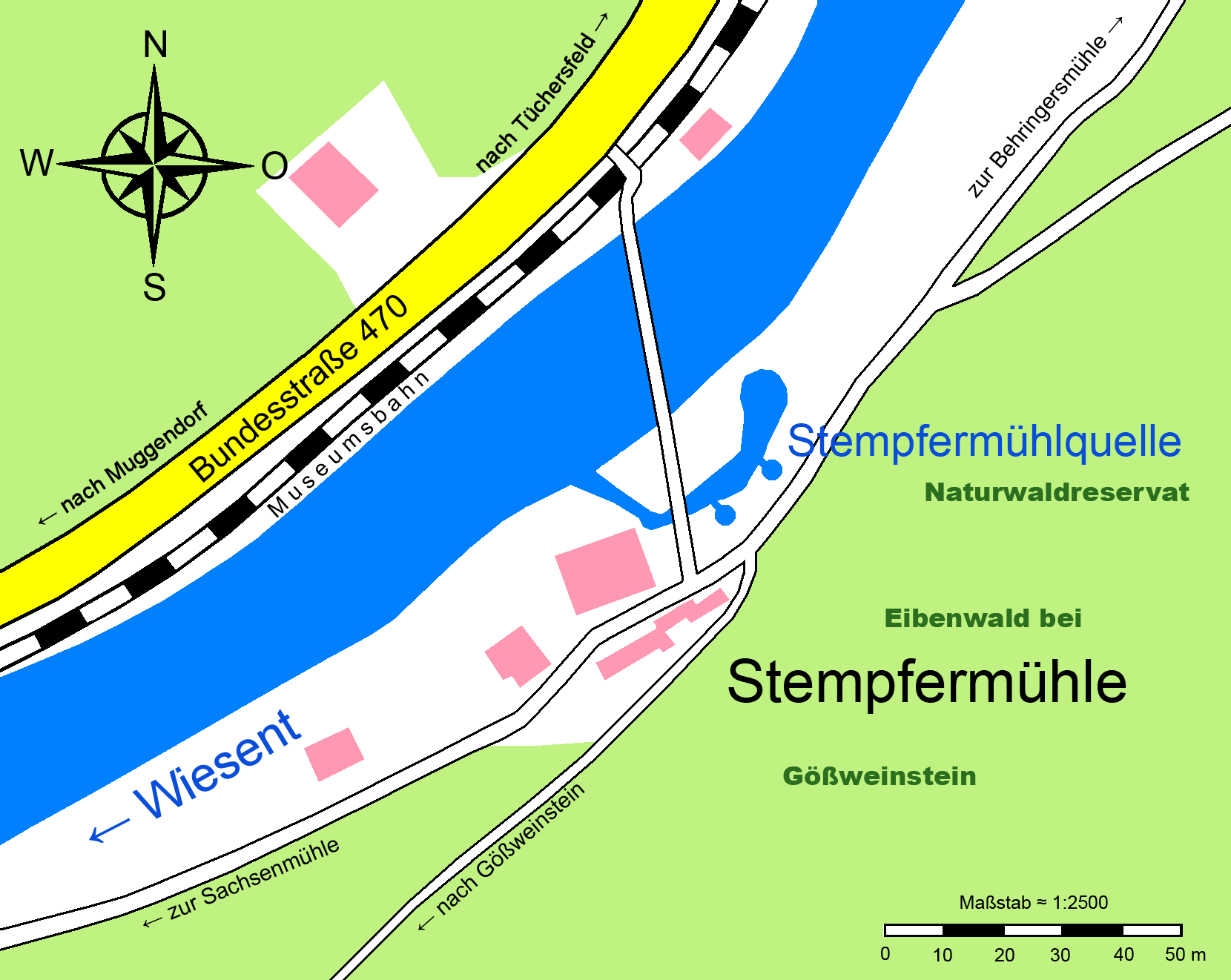 Karte der Stempfermühlquelle bei Gößweinstein, Bayern Gebäude Wald Grünfläche Gewässer Quelle